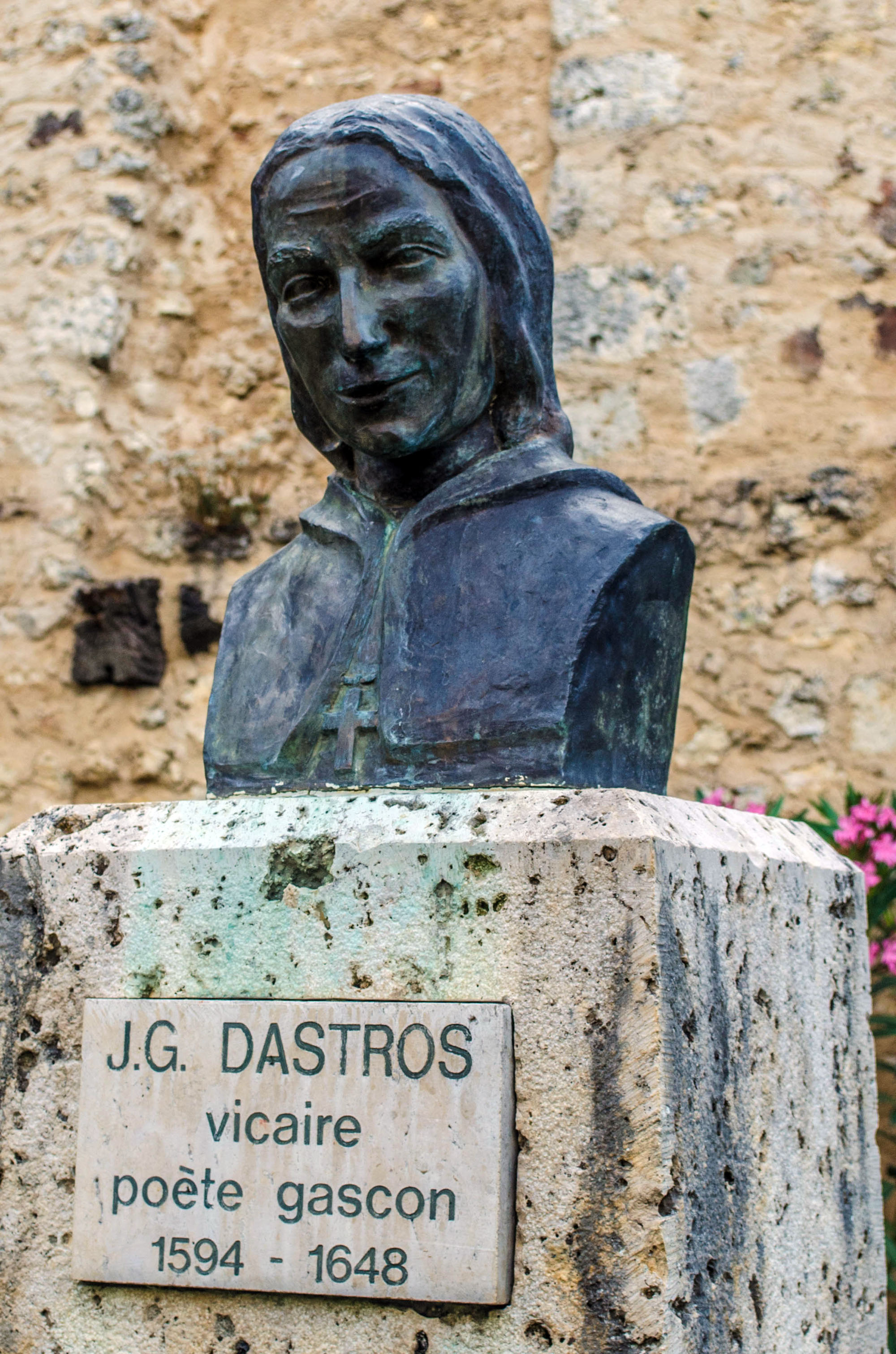 Buste de Jean-Géraud Dastros à Saint-Clar (Gers, France)